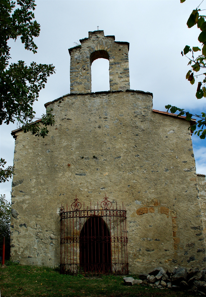 Visible depuis la route de Saint-Girons à Foix, la chapelle de l'Exaltation-de-la-Sainte-Croix se dresse sur un piton au-dessus du village d'Alzen (Ariège, France). .